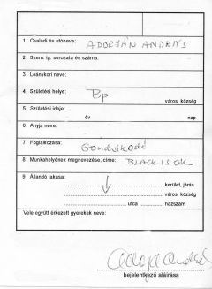 Adorján András sakkozó adatlapja